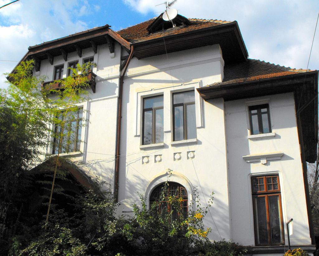 Dumbrava Rosie 3